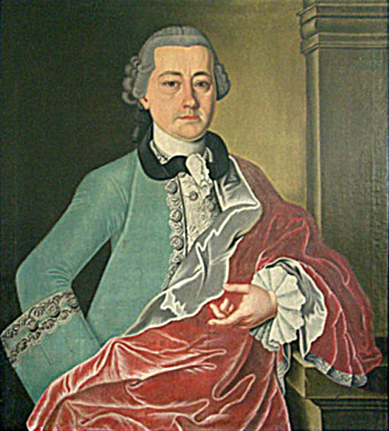 Portrait of Johann Ludwig Schmidt (1726-1792), German jurist